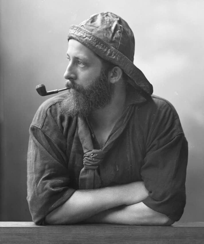 Frans Gustaf Klemming (självporträtt)